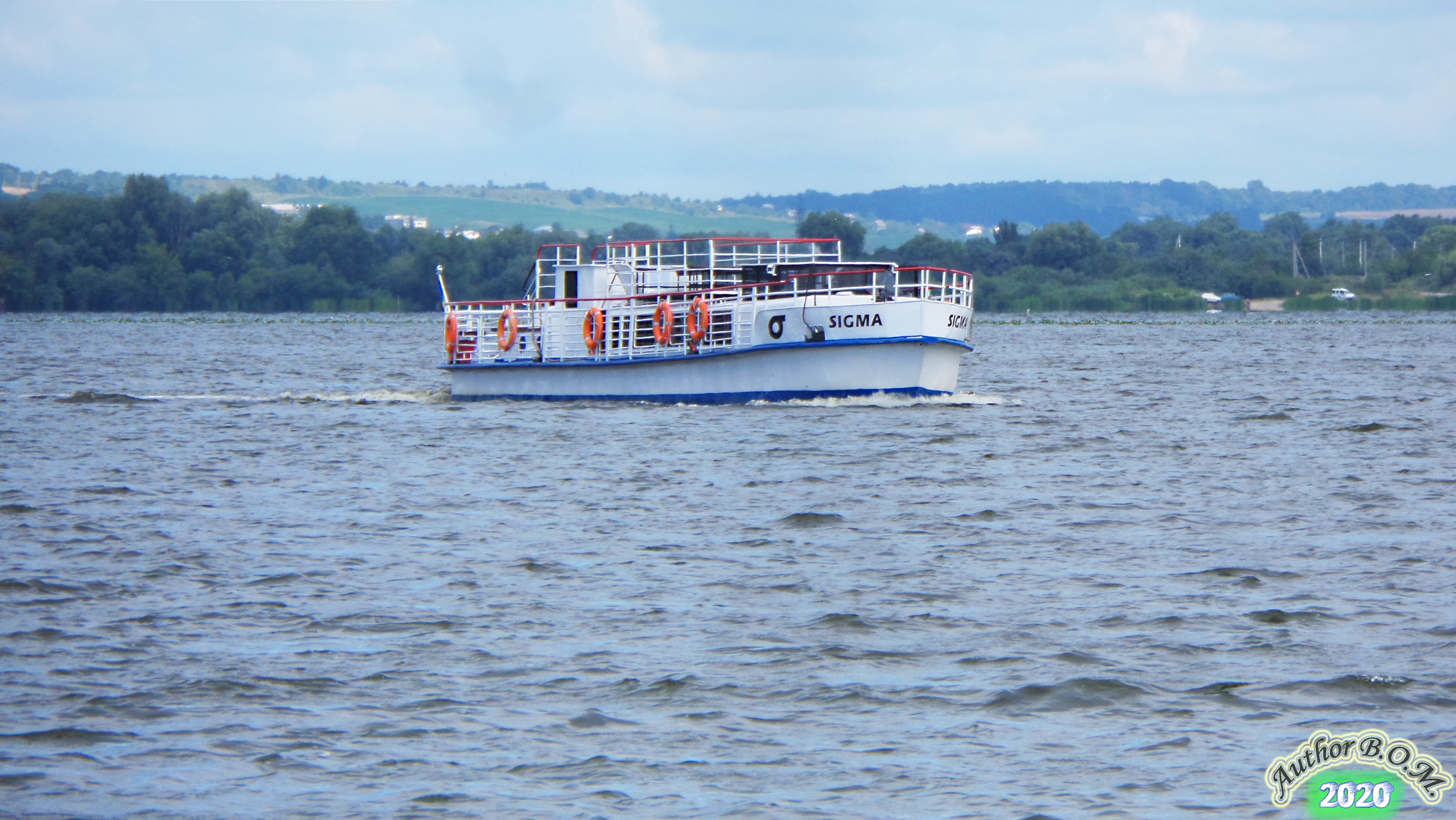 Теплохід "Сігма" на Тернопільському озері